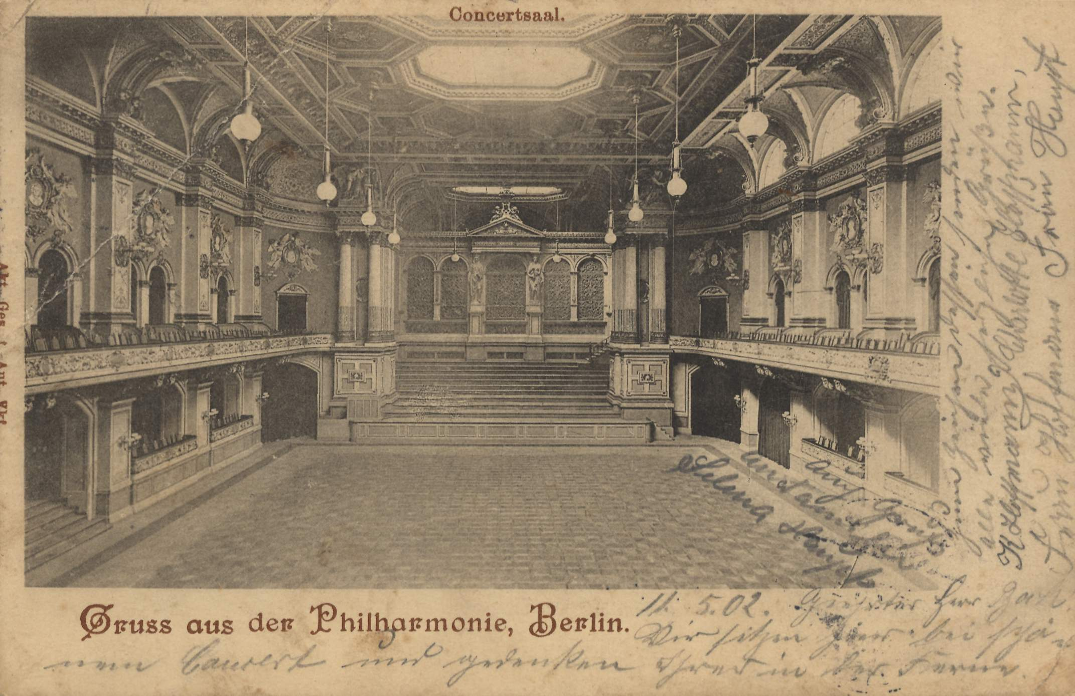 Berliner Philharmonie in der Bernburger Straße 22a/23 in Berlin-Kreuzberg. Das Gebäude wurde am 30. Januar 1944 durch Fliegerbomben zerstört.